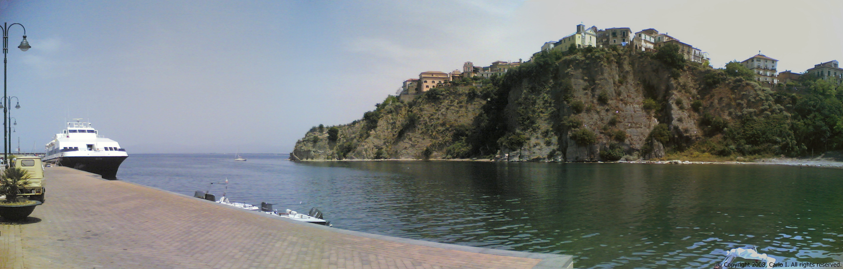 Carlo Iannuzzi, Opera Propria, Agropoli - Il Metrò del Mare al Porto, GFDL e Creative Commons CC-BY-SA tutte le versioni (3.0, 2.5, 2.0 e 1.0), sono l'autore